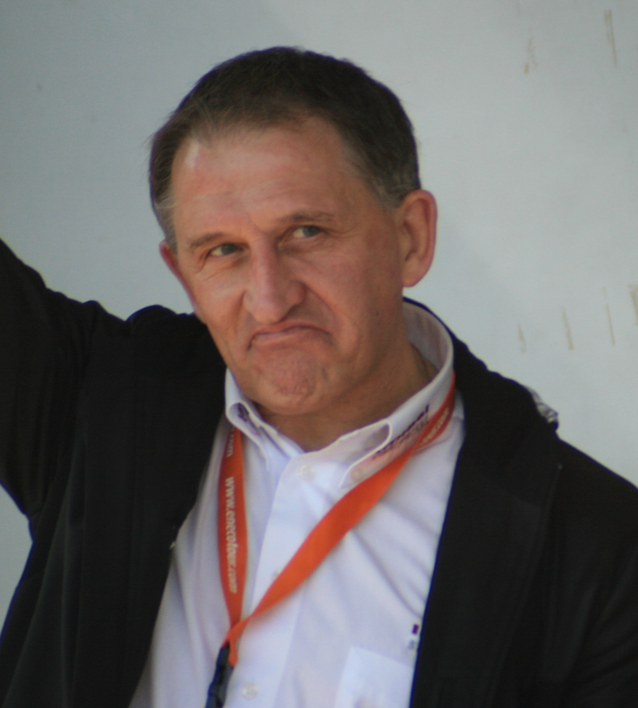 Freddy Maertens, durant l'Eneco Tour 2008